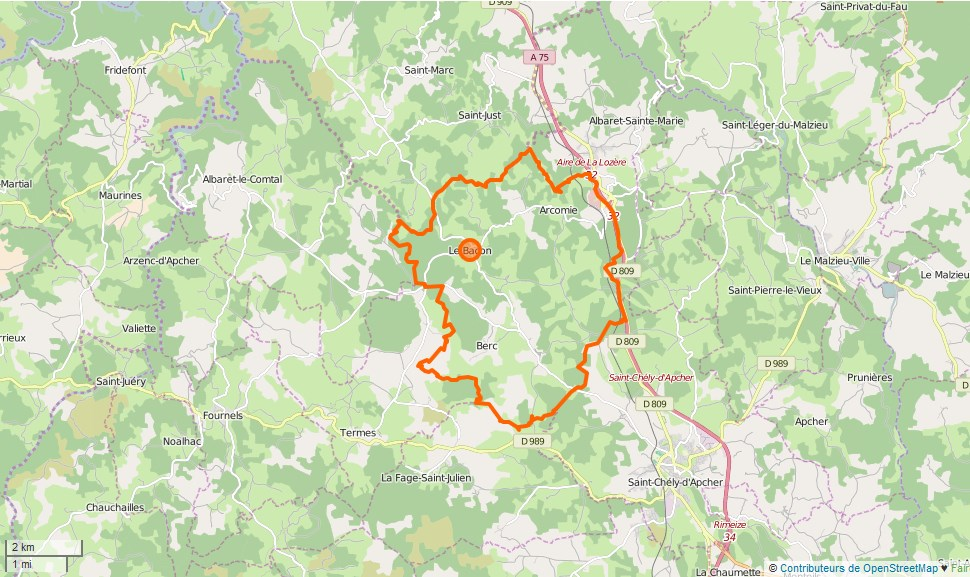 Les Monts-Verts Limite communale This map may be incomplete, and may contain errors. Don't rely solely on it for navigation.